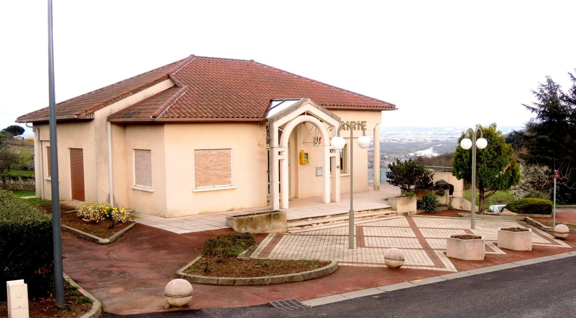 Charnas détail